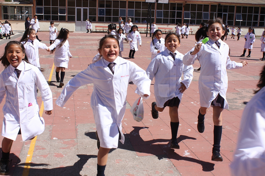 Escolares de Enseñanza básica de Talcahuano (2011). "Normal regreso a clases de estudiantes choreros".